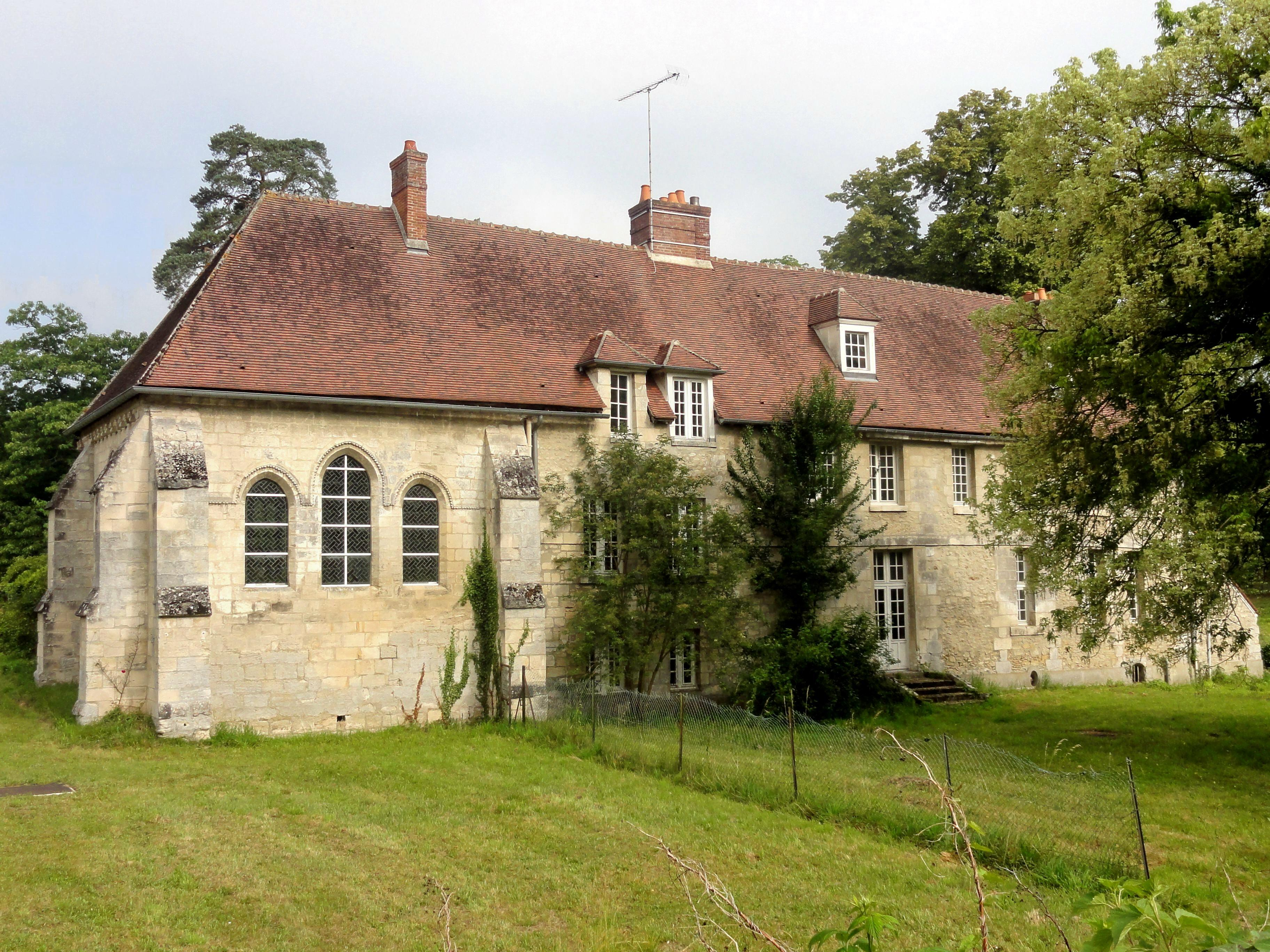 Poste forestier de Sainte-Perrine.